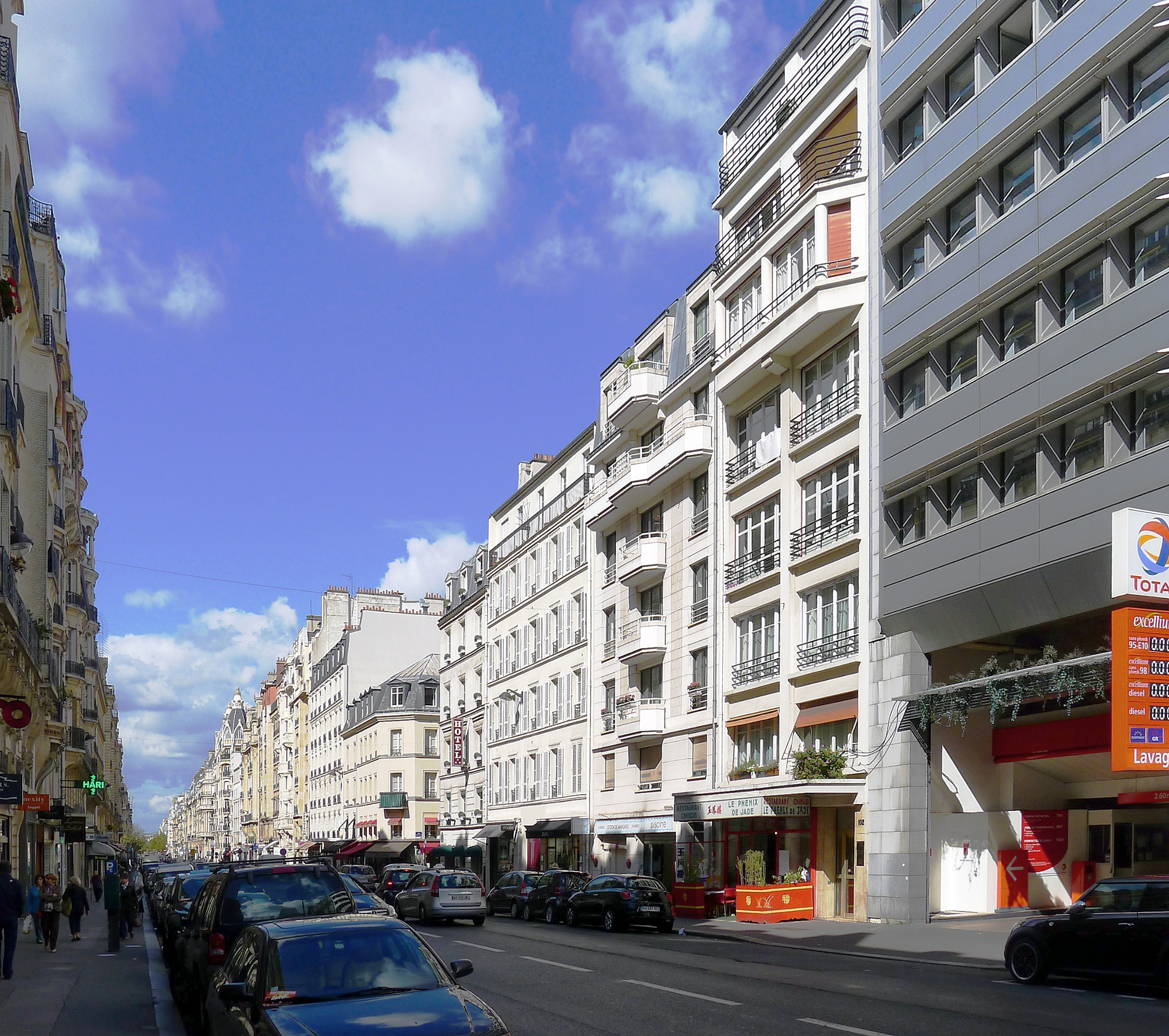 Rue de Courcelles - Paris XVII